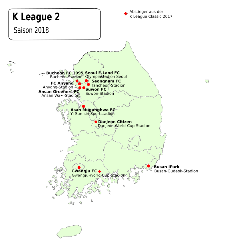 K League 2 Spielorte